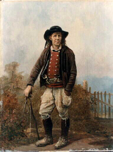 Homme de Châteauneuf-du-Faou vers 1850, tableau de Louis Caradec (1802-1888)/